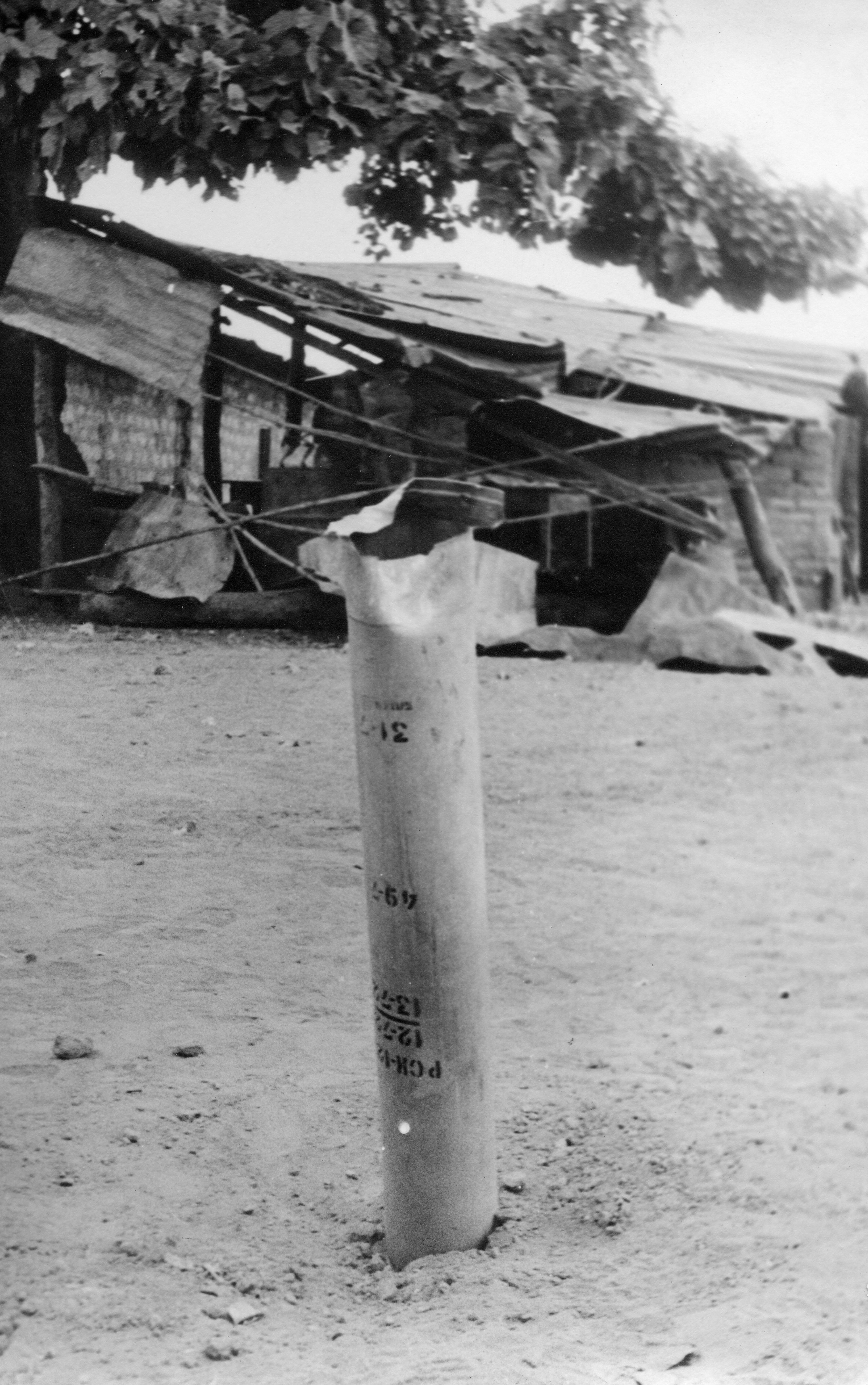 Descrição Míssil do PAIGC que acertou no centro da CCaç5 em Canjadude - antiga Guiné portuguesa (1973 ou 1974). Fonte Carregada pelo autor Autor João Carvalho